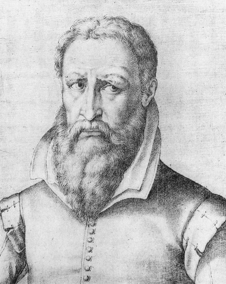 Grabado en blanco y negro del pintor Pedro de Campaña.